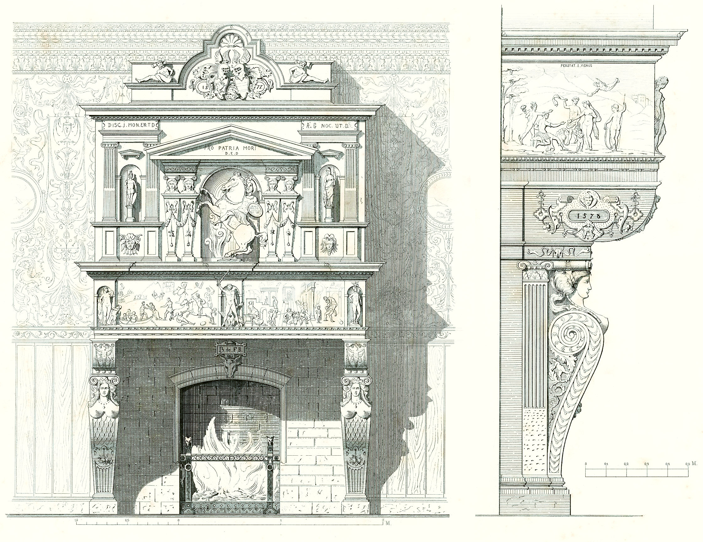 Zeichnung eines relief-verzierten Sandsteinkamins auf Schloss Hugenpoet in Essen-Kettwig